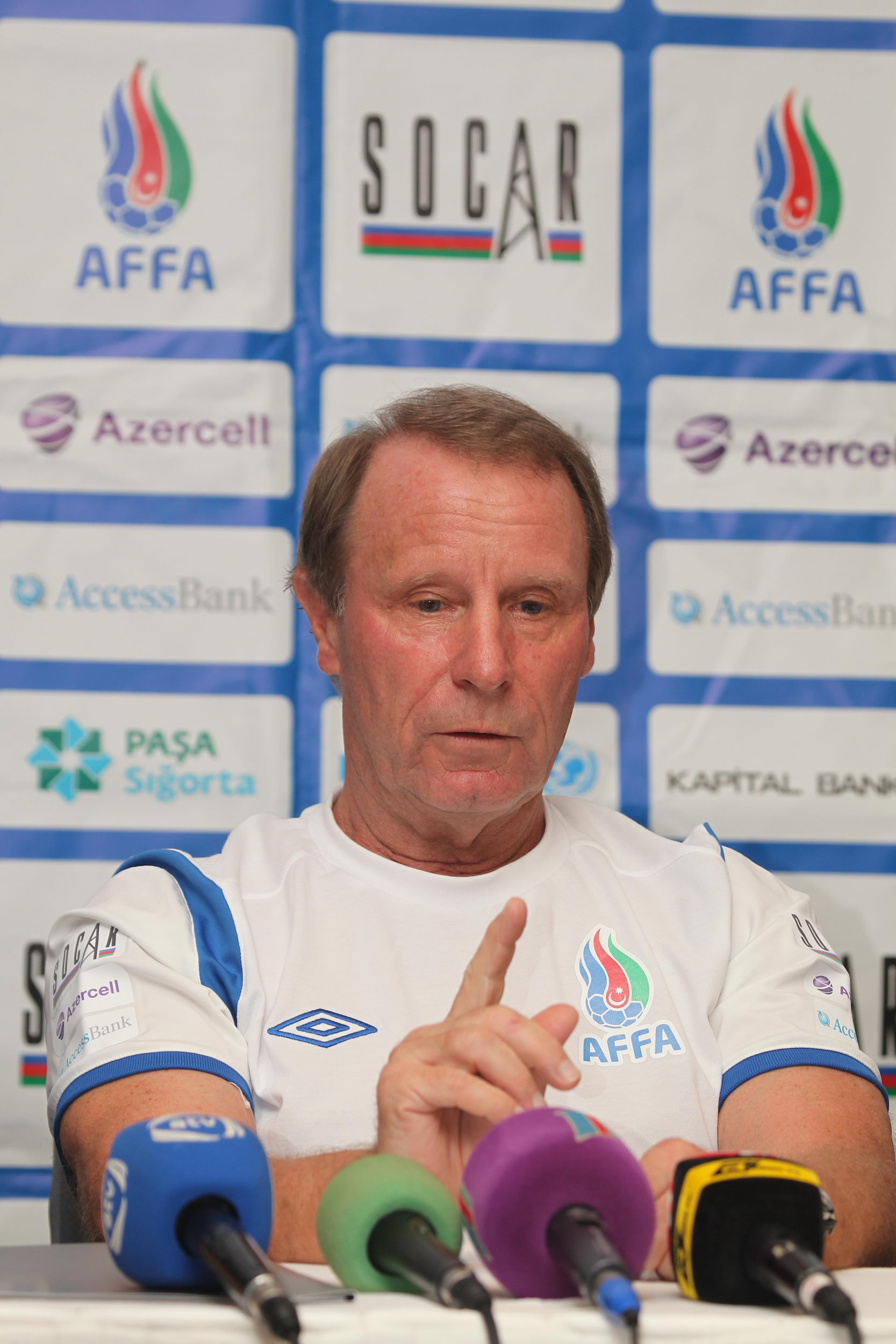 Berti Foqts